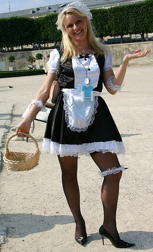 french maid mucama palais des tuileries palacio de las tullerías